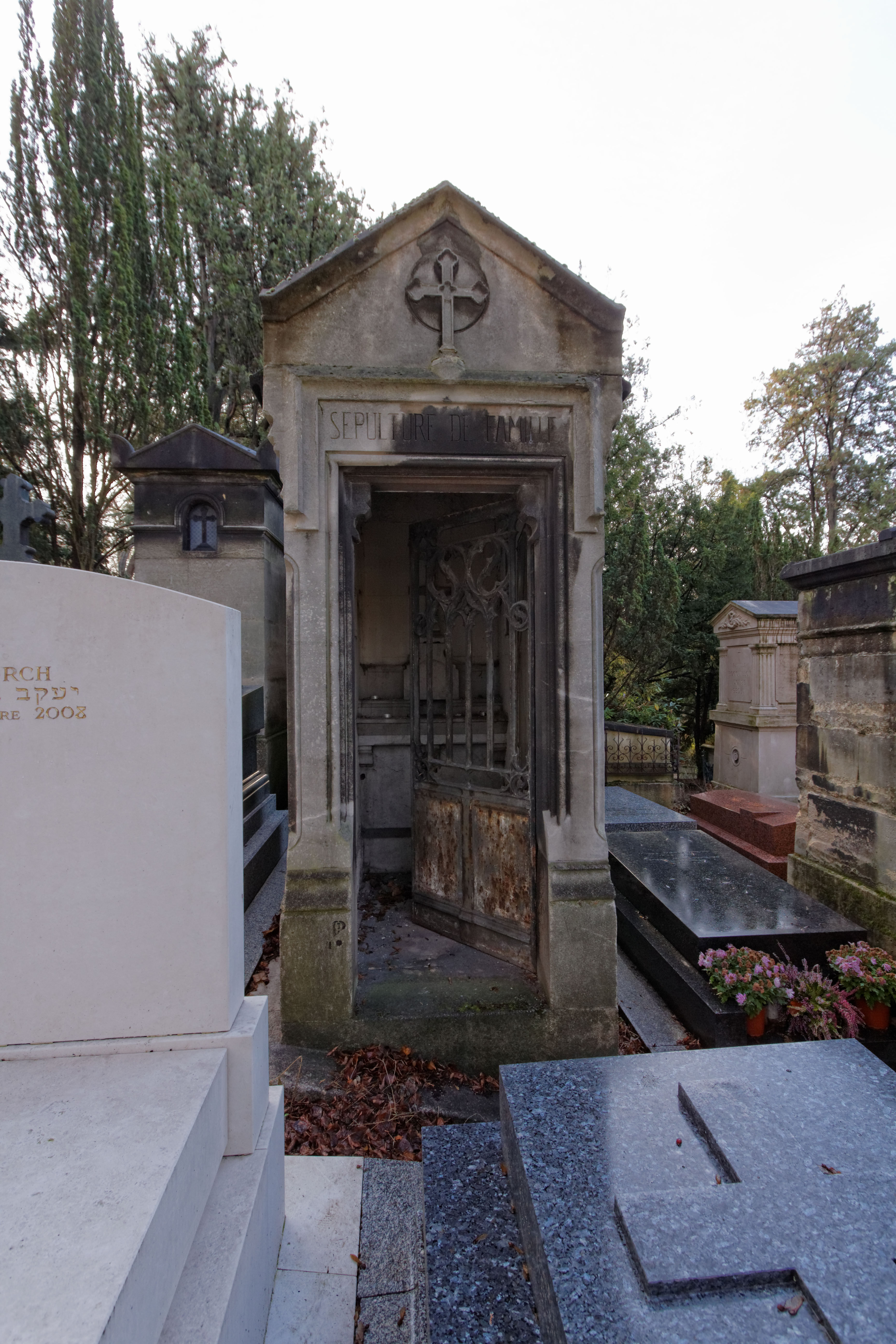 Chapelle